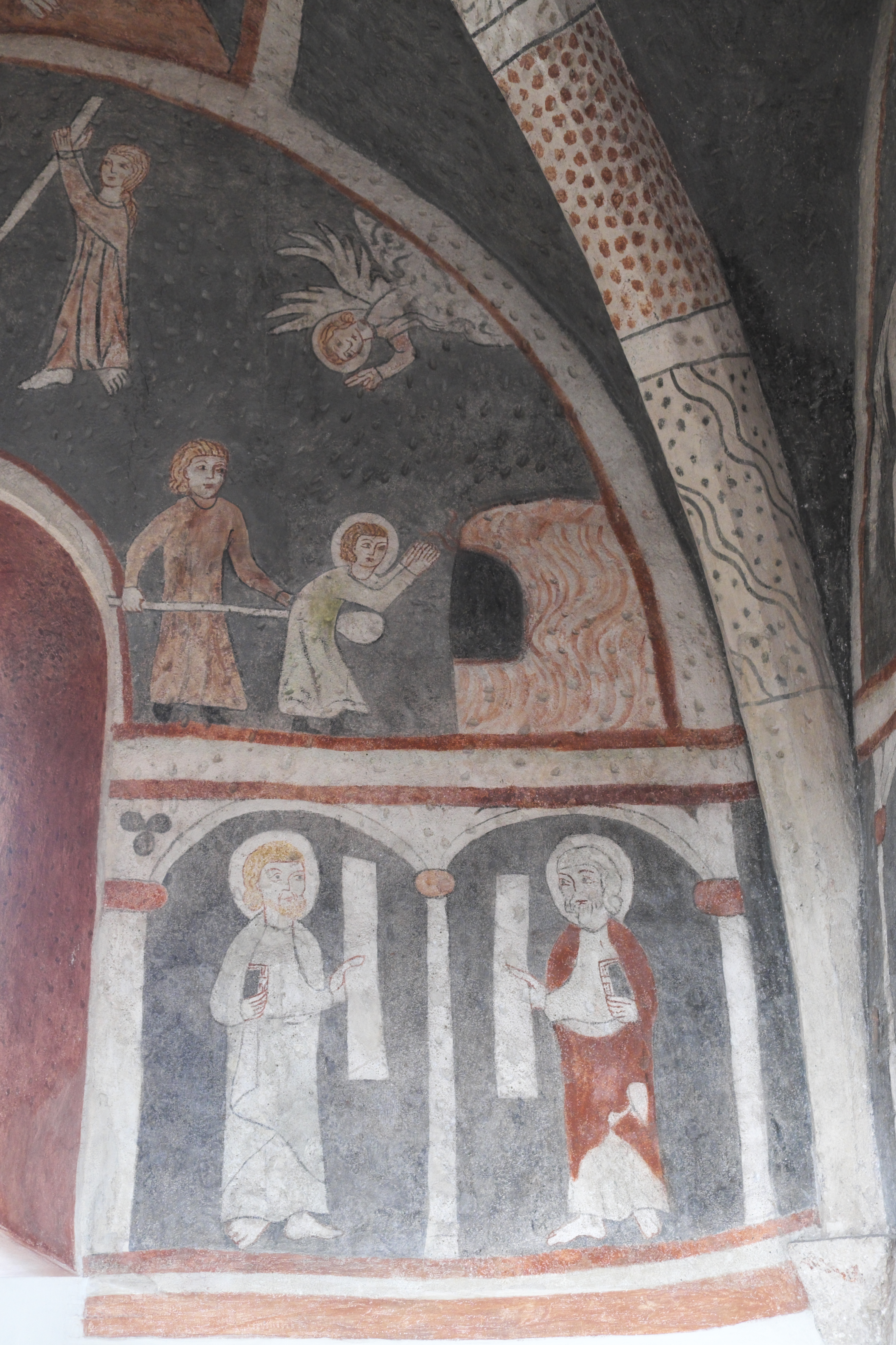 Katholische Pfarrkirche St. Vitus in Kottingwörth (Beilngries) im oberbayerischen Landkreis Eichstätt (Bayern/Deutschland), Wand- und Deckenmalereien in der Vituskapelle, in Fresko- und Seccotechnik, wohl nach 1313 entstanden